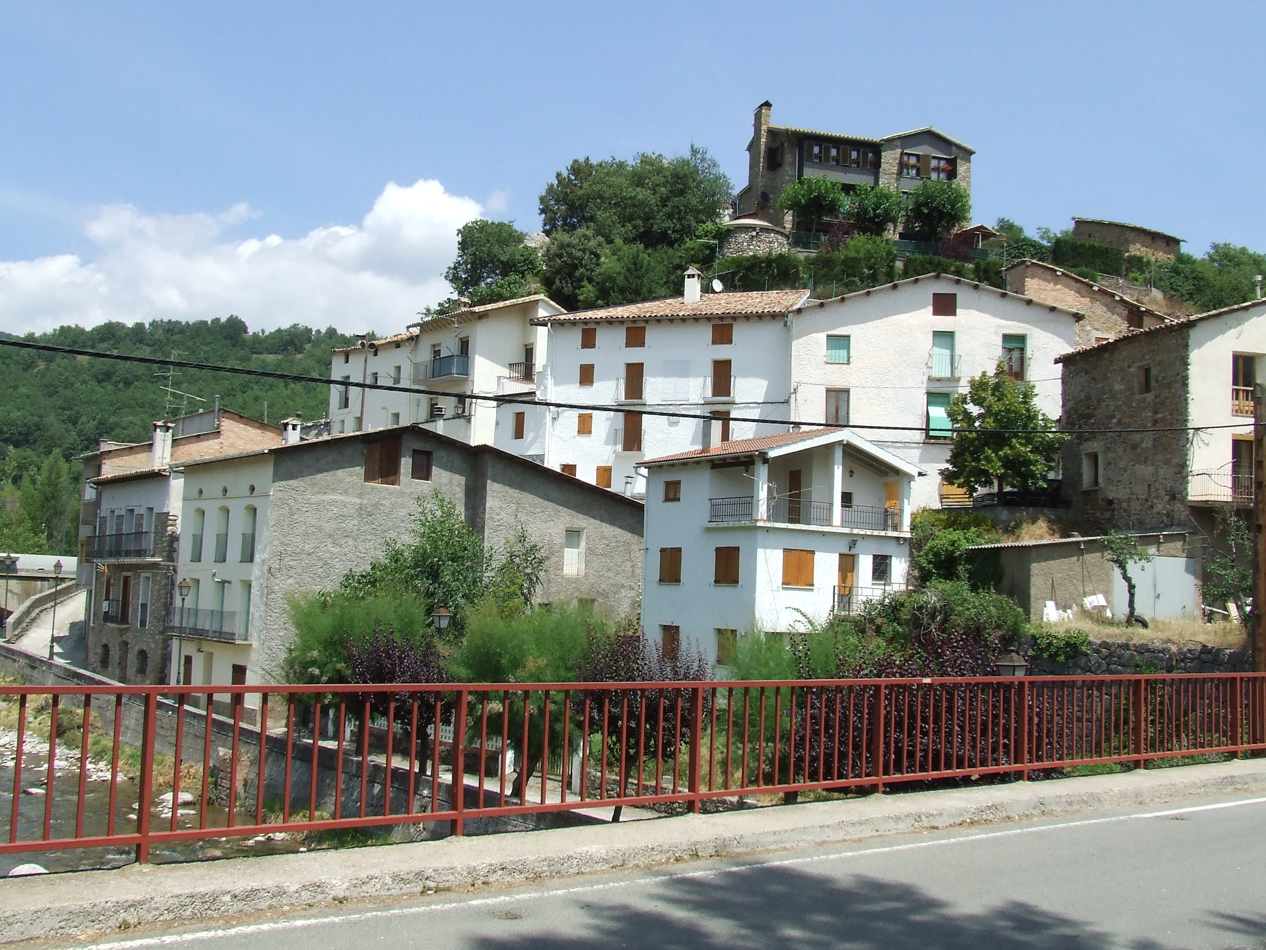 Senterada (Pallars Jussà)